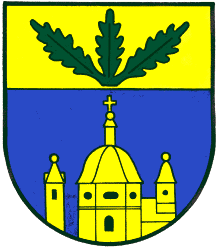 Wappen der Gemeinde Haselsdorf-Tobelbad in Österreich